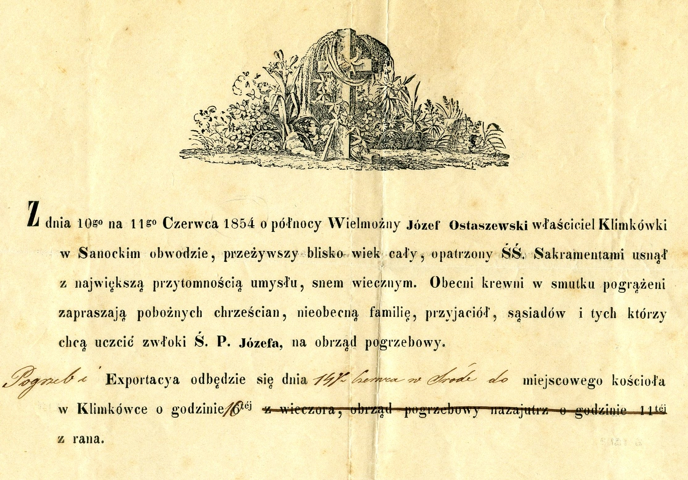 Klepsydra Jozefa Ostaszewskiego, wlasciciela Klimkowki, zm. 1854